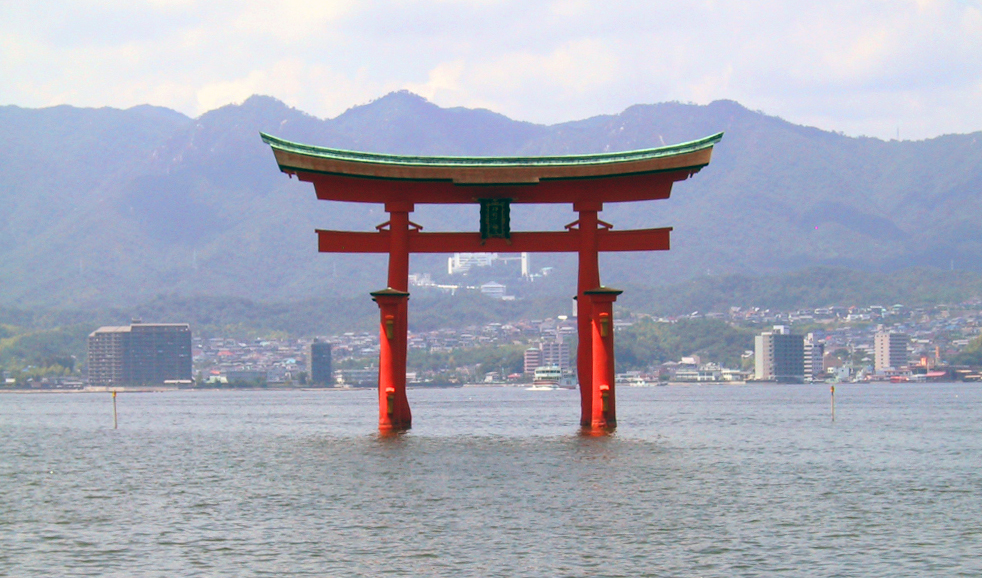 A Japanese torii at Itsukushima Shrine